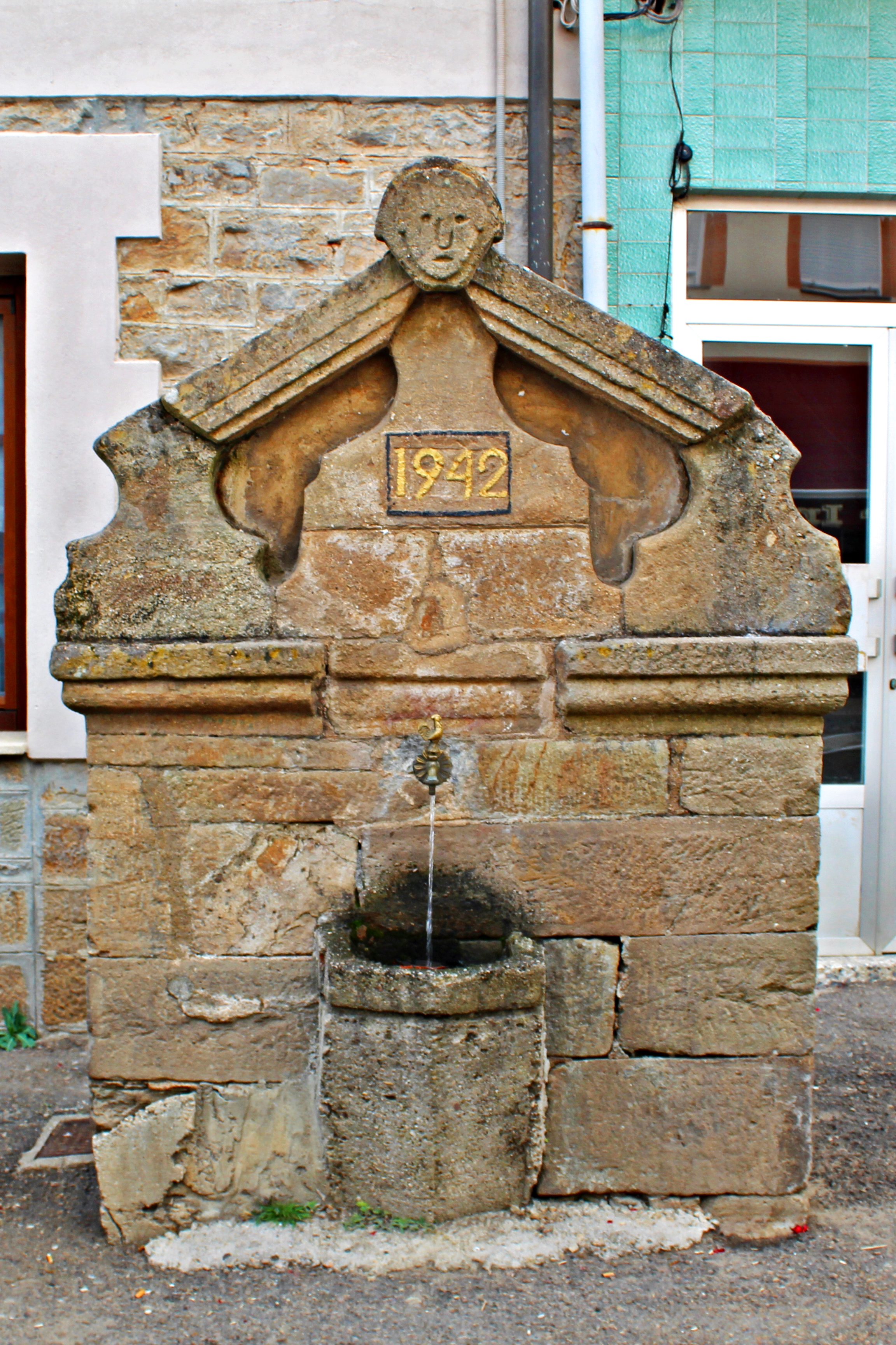 Quintana de Fuseros, municipio de Igüeña, comarca de El Bierzo, provincia de León.